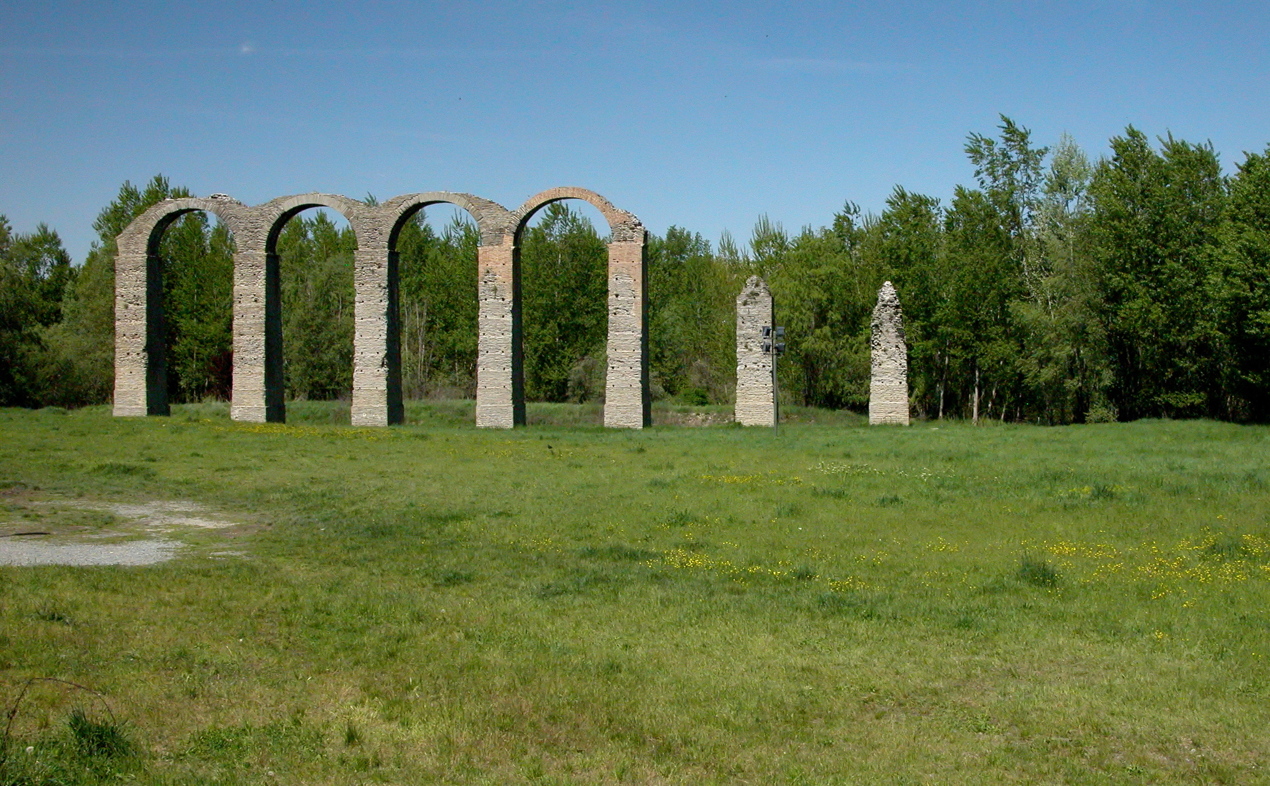 Acqui Terme, Roman aqueduct, Imperial ages.